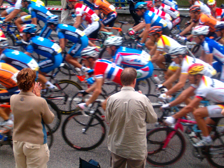 Mondiali di ciclismo su strada a Verona (2004)